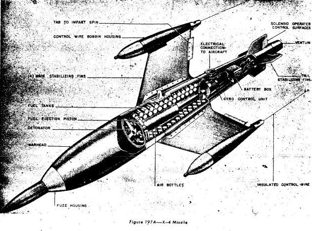 Ruhrstahl X-4 Luft-Luft-Rakete